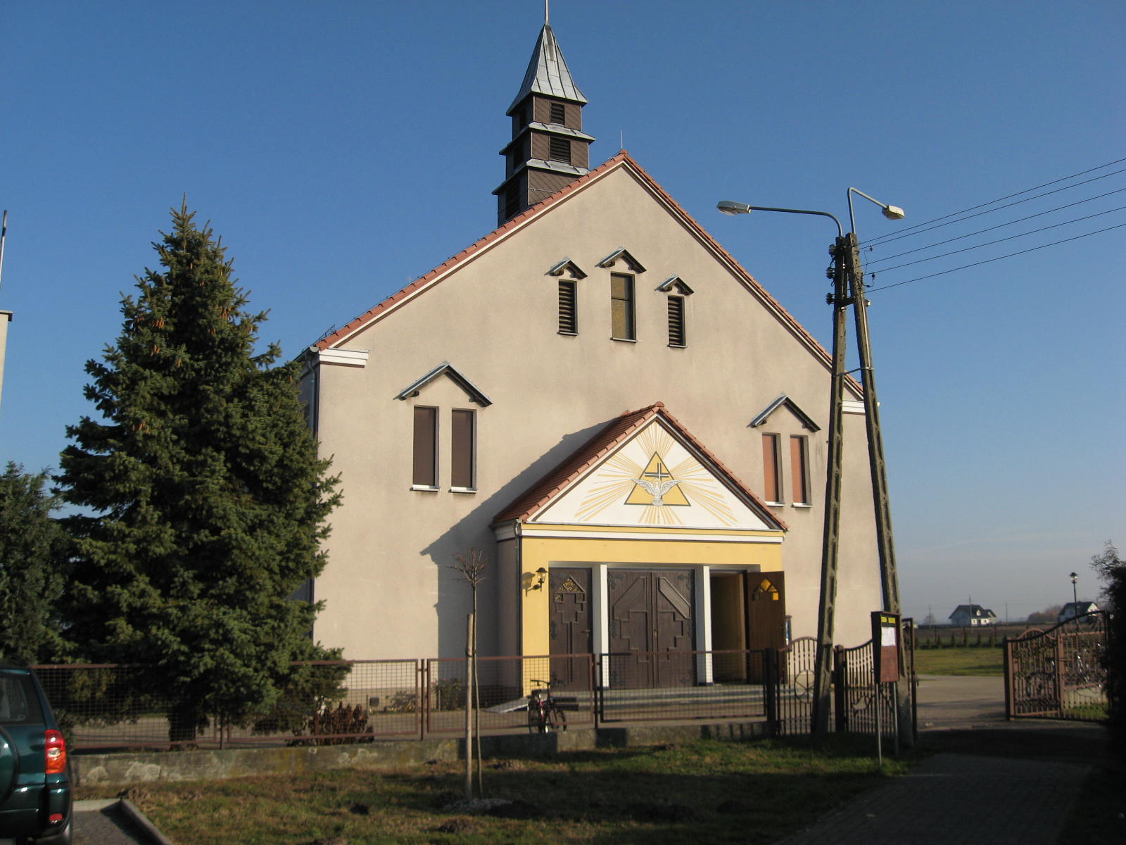 Borkowice - kościół św. Józefa Robotnika